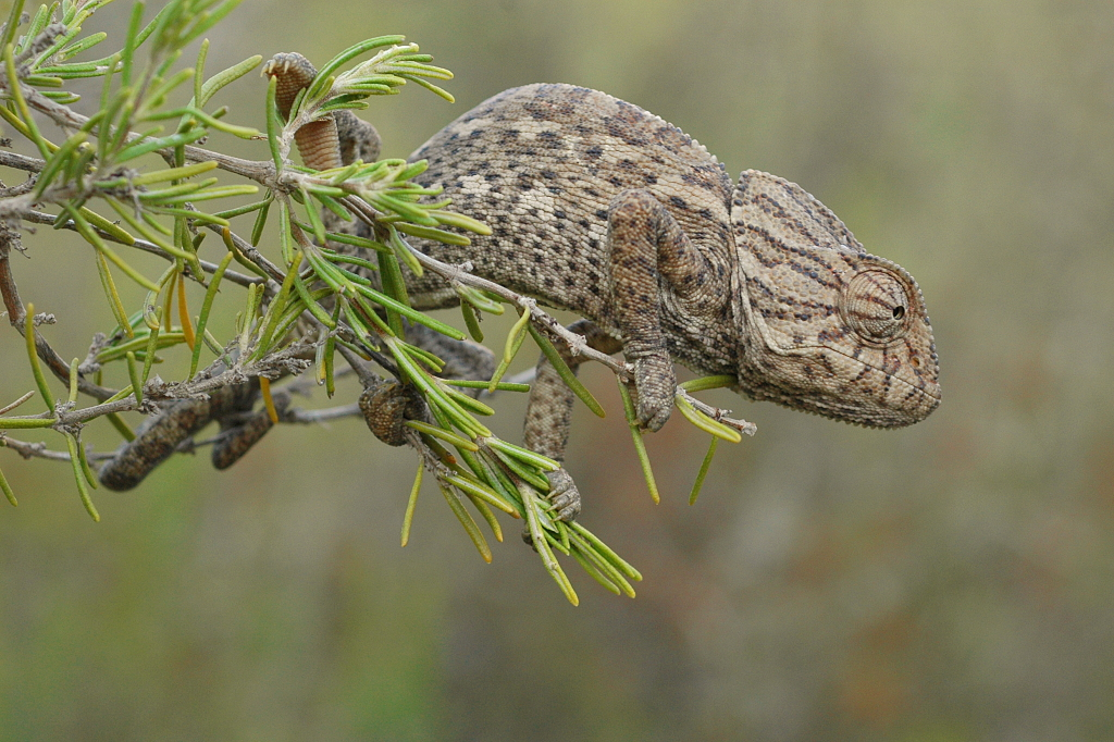 Un ejemplar de la sierra de Cartagena (Murcia, Spain) sobre un arbusto de romero